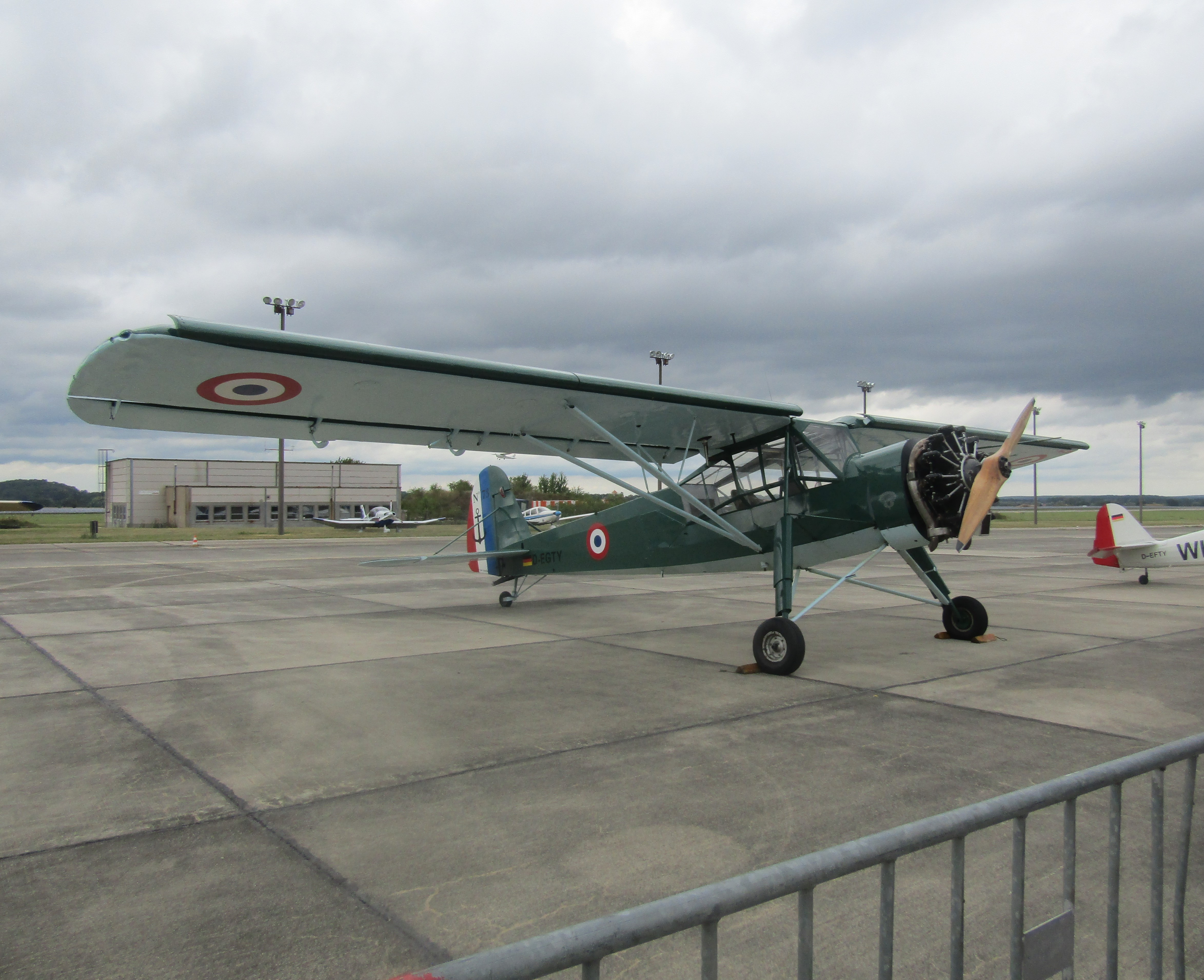 Morane-Saulnier MS-505 Criquet (D-EGTY) bei den Bautzener Flugtagen 2019